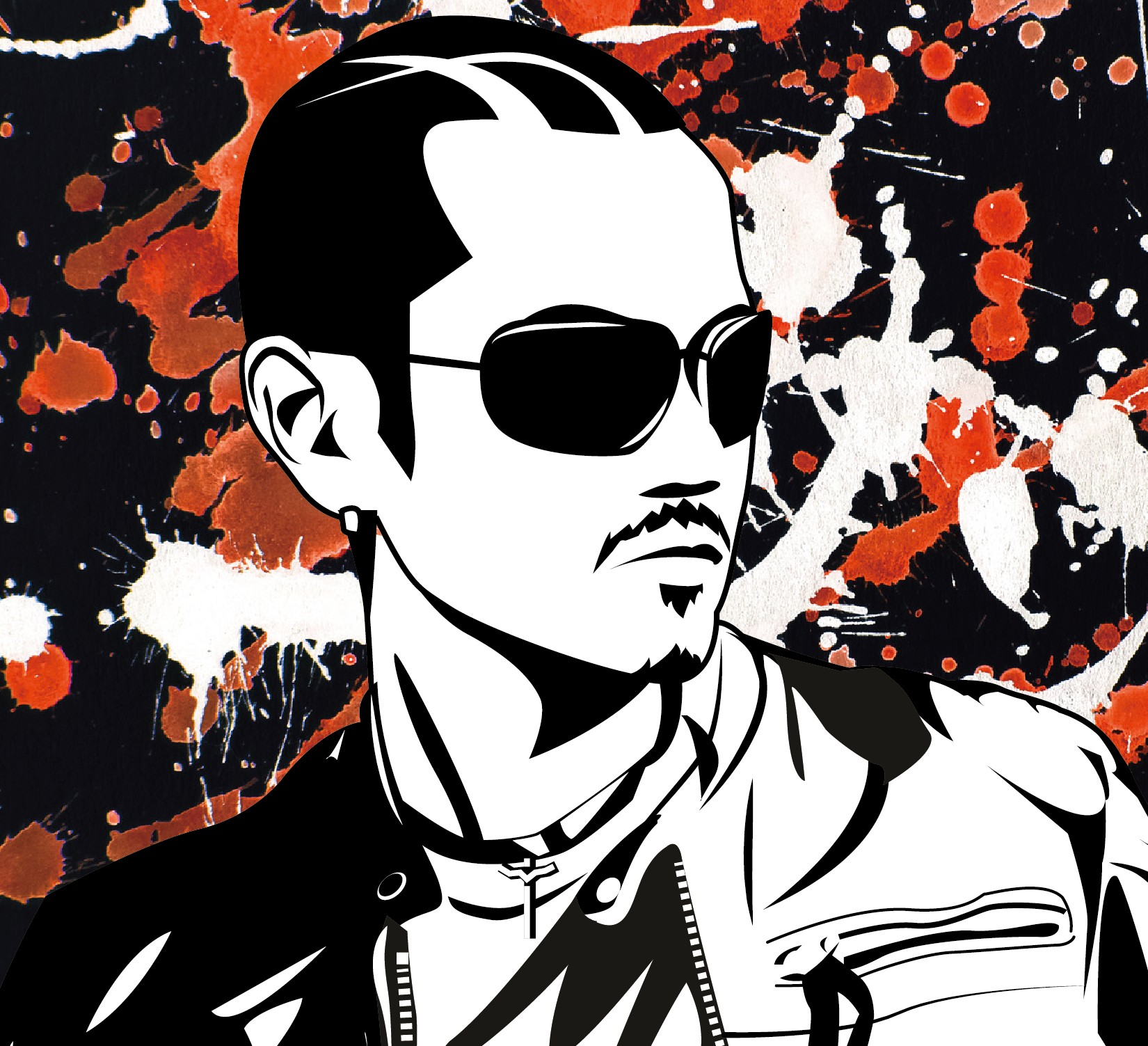 バリカンアートの例